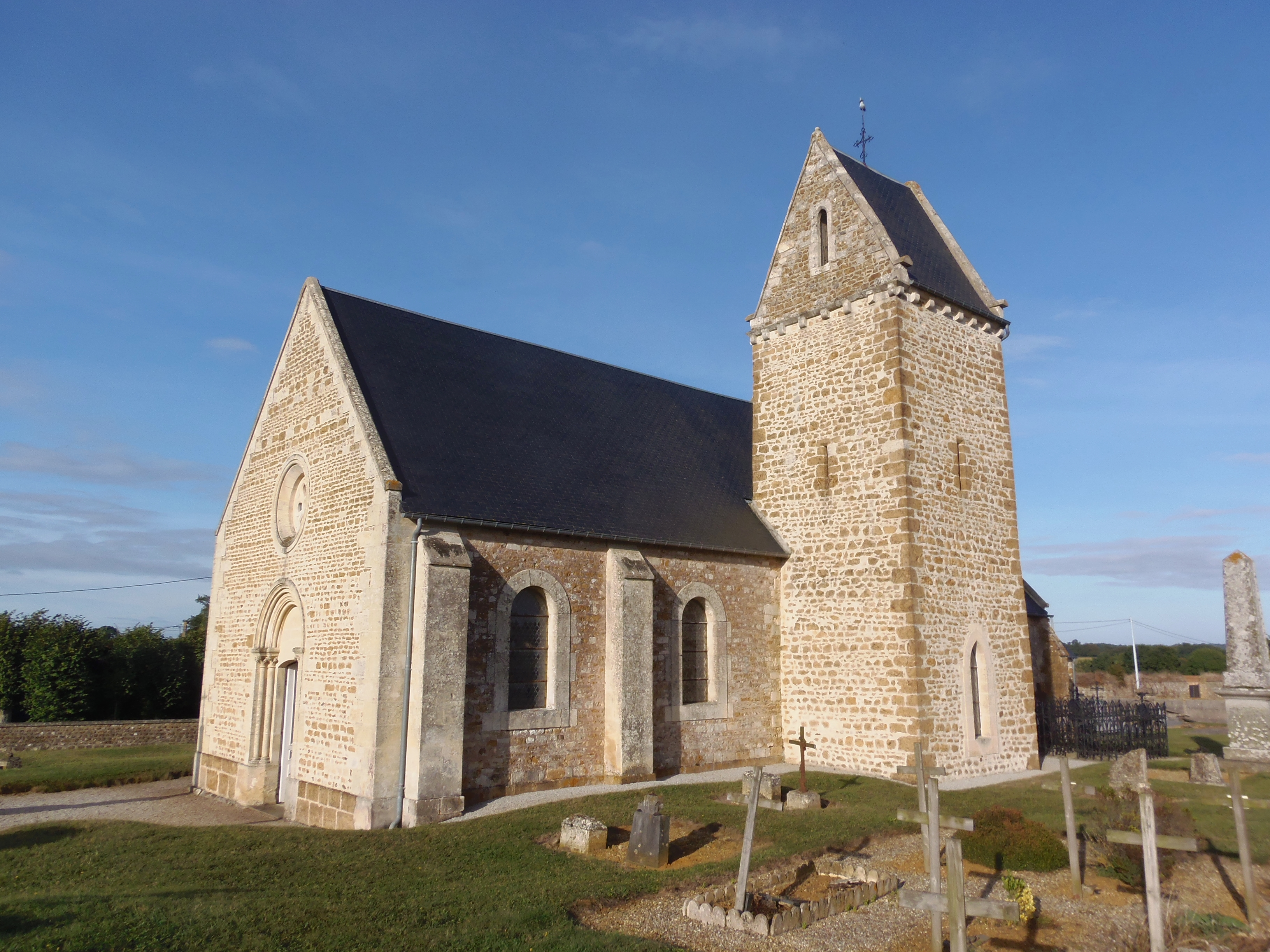 Martainville (Normandie, France). L'église Saint-Sylvain.